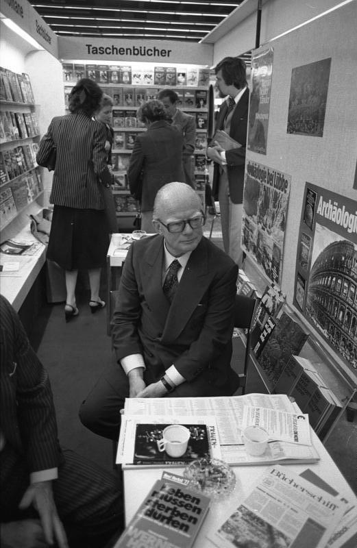 29. Frankfurter Buchmesse Ausstellungsstände (Werner Höfer)